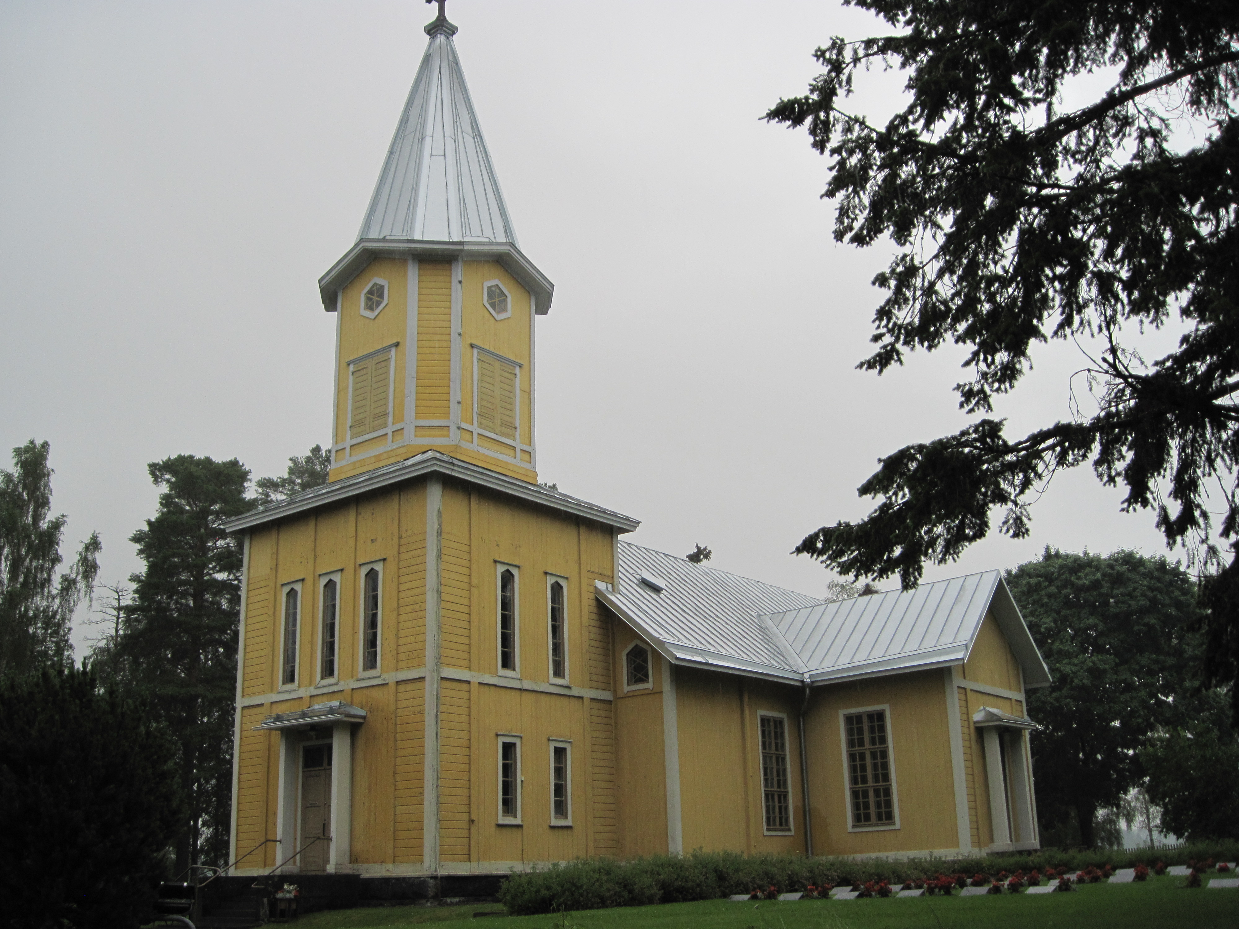 Kullaan kirkko Ulvilassa kesällä 2012. Kirkko on rakennettu vuosina 1766–1767 Tuomas Ravoniuksen johdolla.